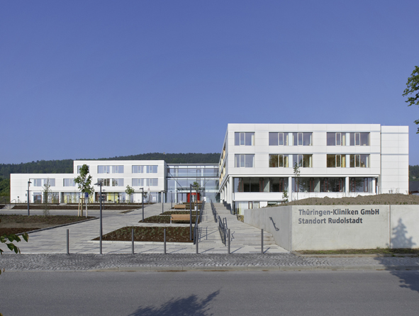 Neubau des Klinikstandortes Rudolstadt